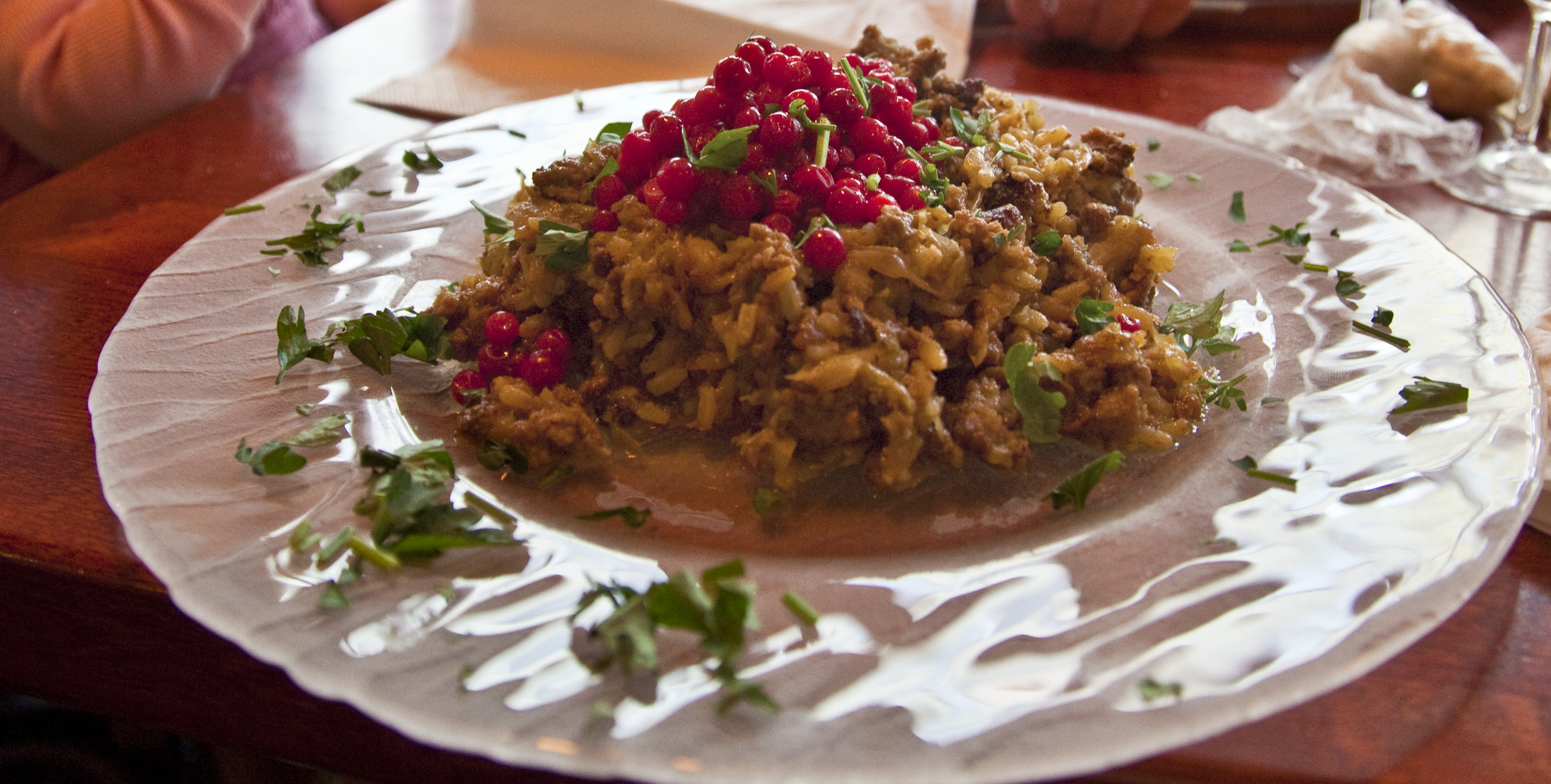 Very tasty indeed!